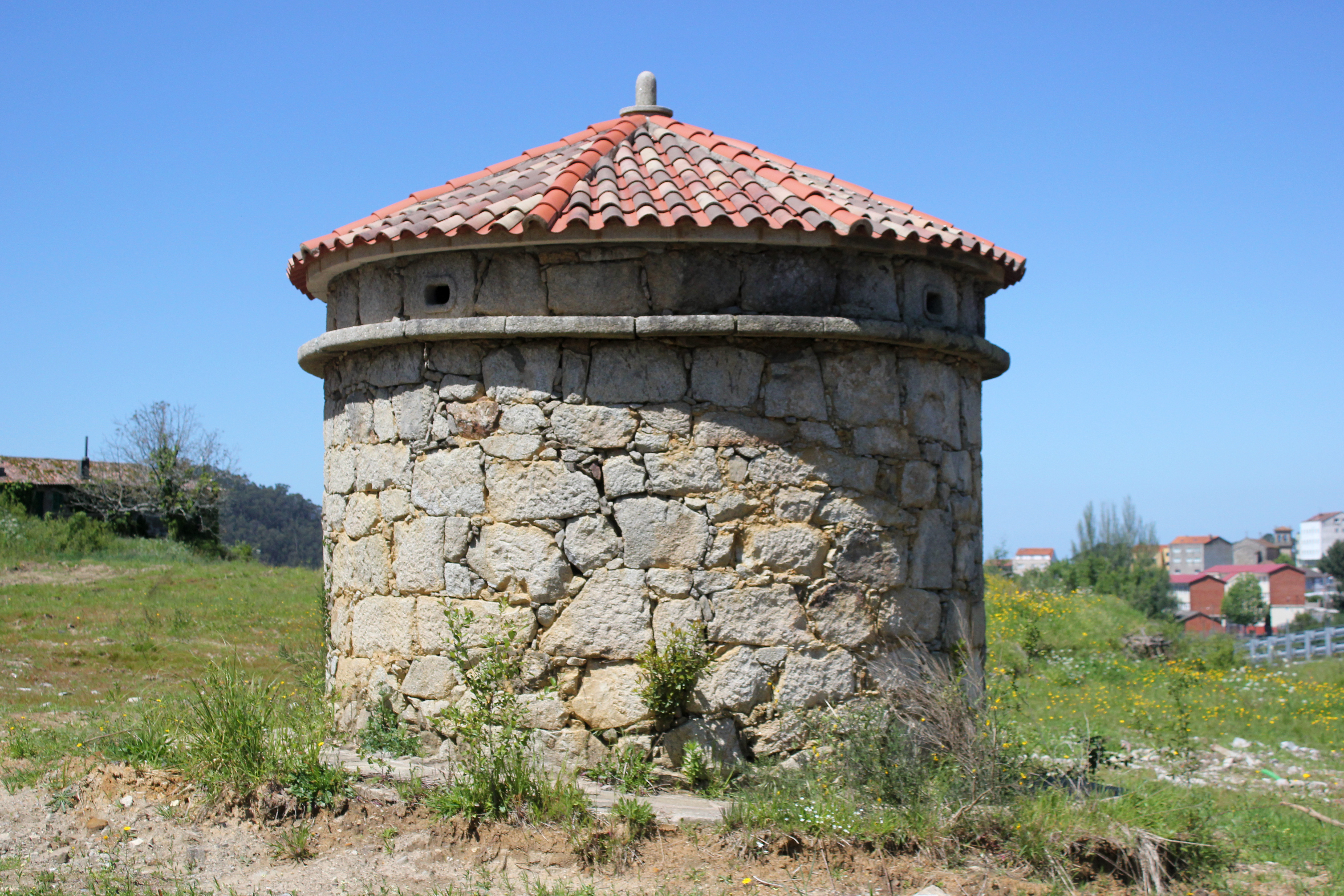 Pombal na Torre, no concello de Marín.